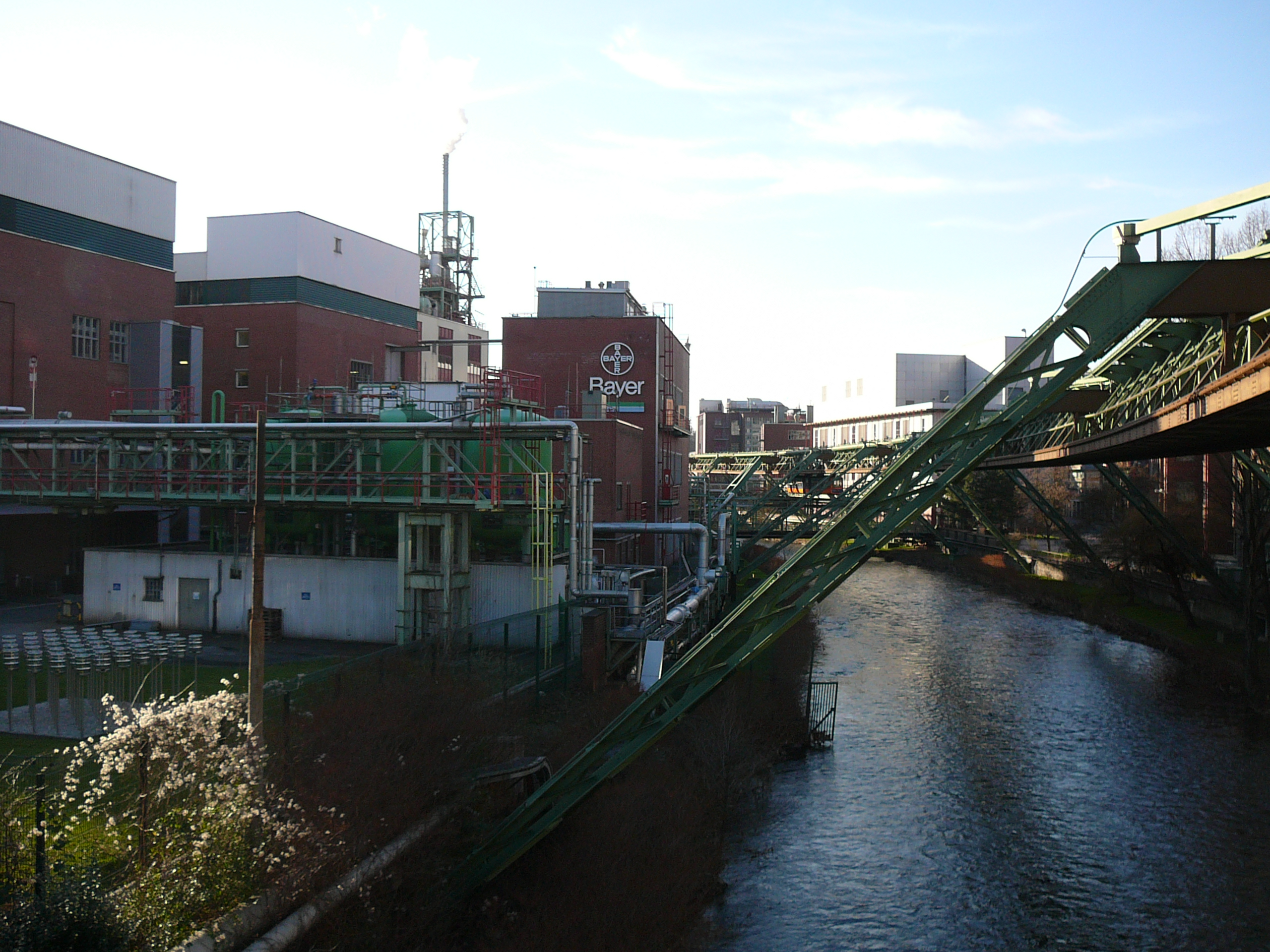 Friedrich-Ebert-Str., Wuppertal